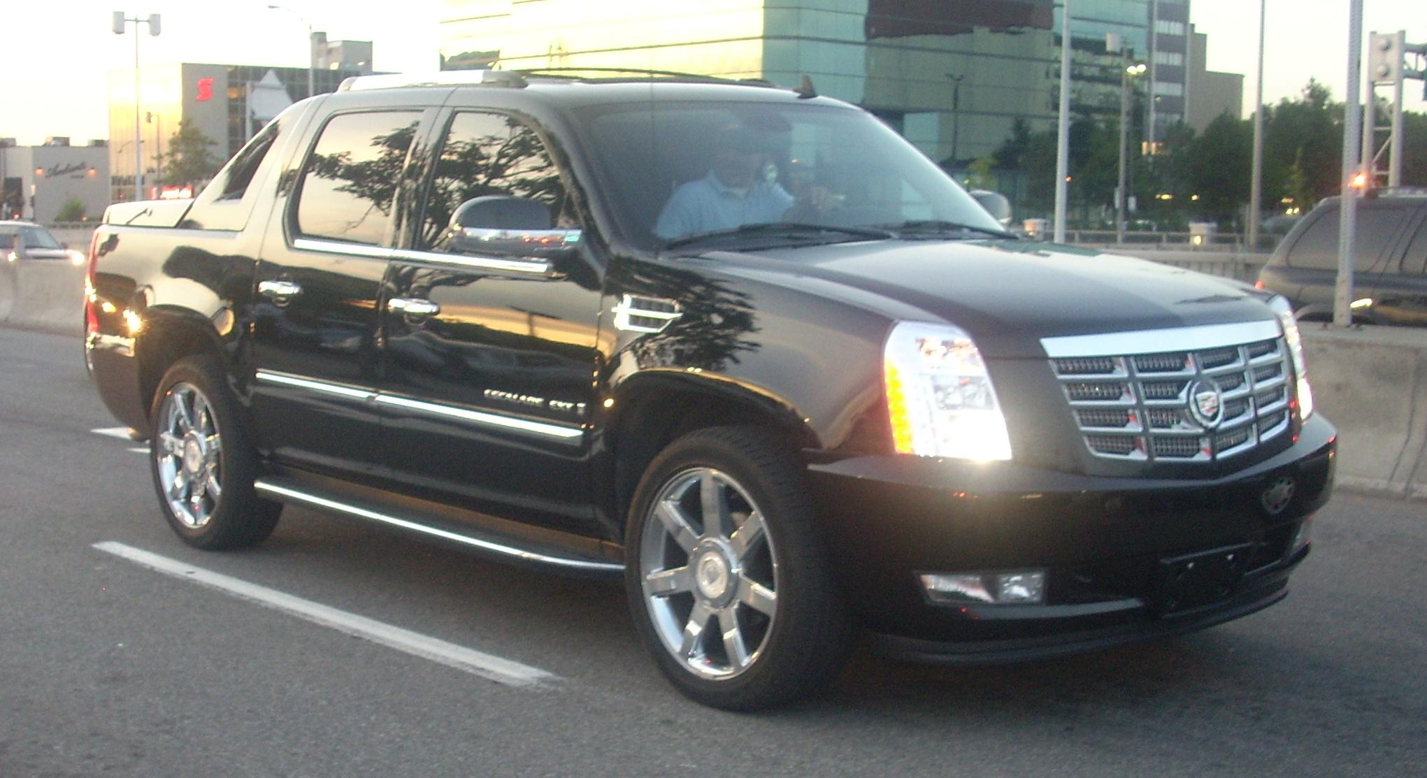 2007-present Cadillac Escalade EXT photographed in Montreal, Quebec, Canada.